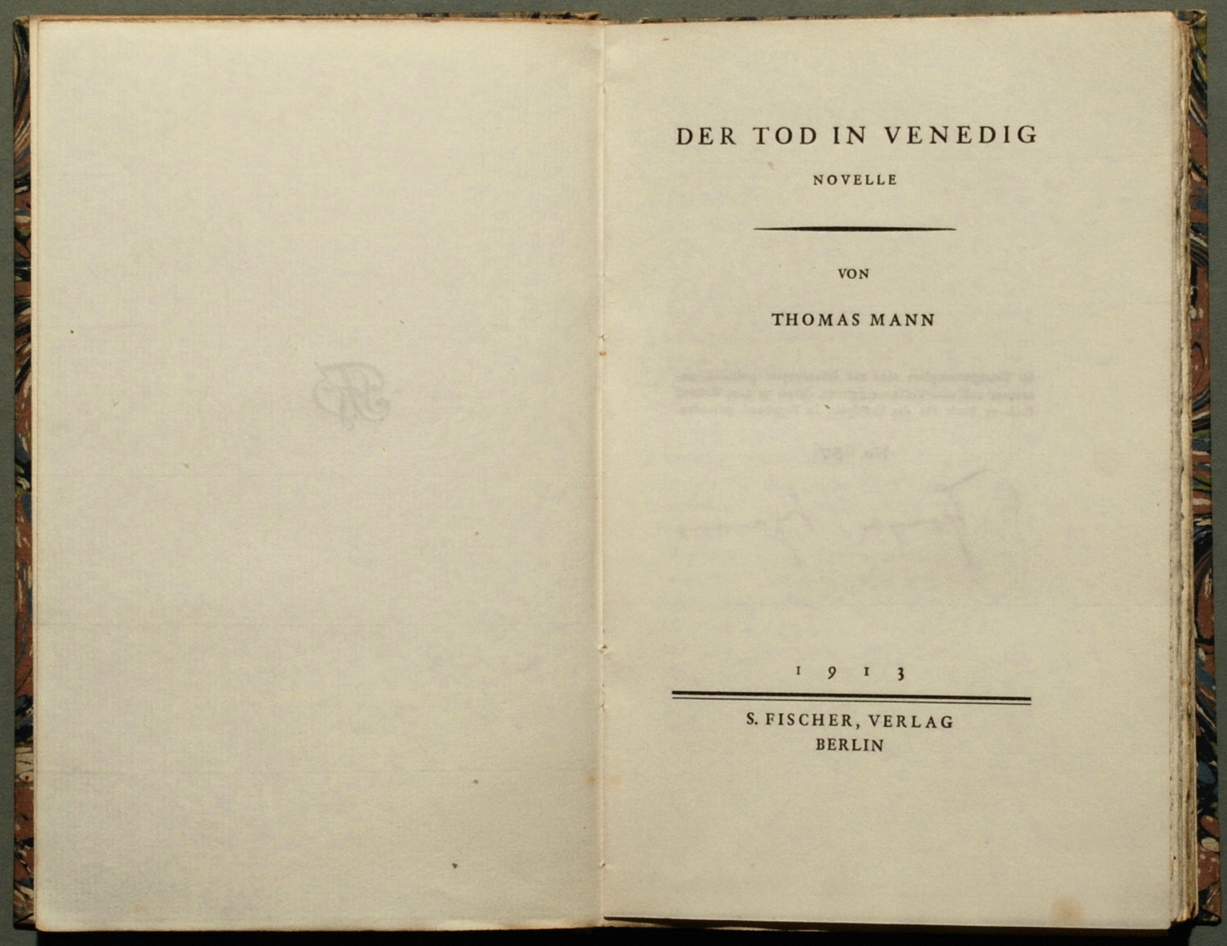 Thomas Mann: Der Tod in Venedig. Novelle. Berlin: S. Fischer 1913. Fliegendes Blatt + Blatt mit Verlags-Signet + Titel verso Impressum + Schmutztitel + Seiten 9 - 145 + 1 Blatt Verlagsanzeigen. - Limitierte Vorzugsausgabe von 60 Exemplaren auf Bütten, davon 50 in den Handel gegeben, hier Nr. 57. Potempa E26.3 [1]